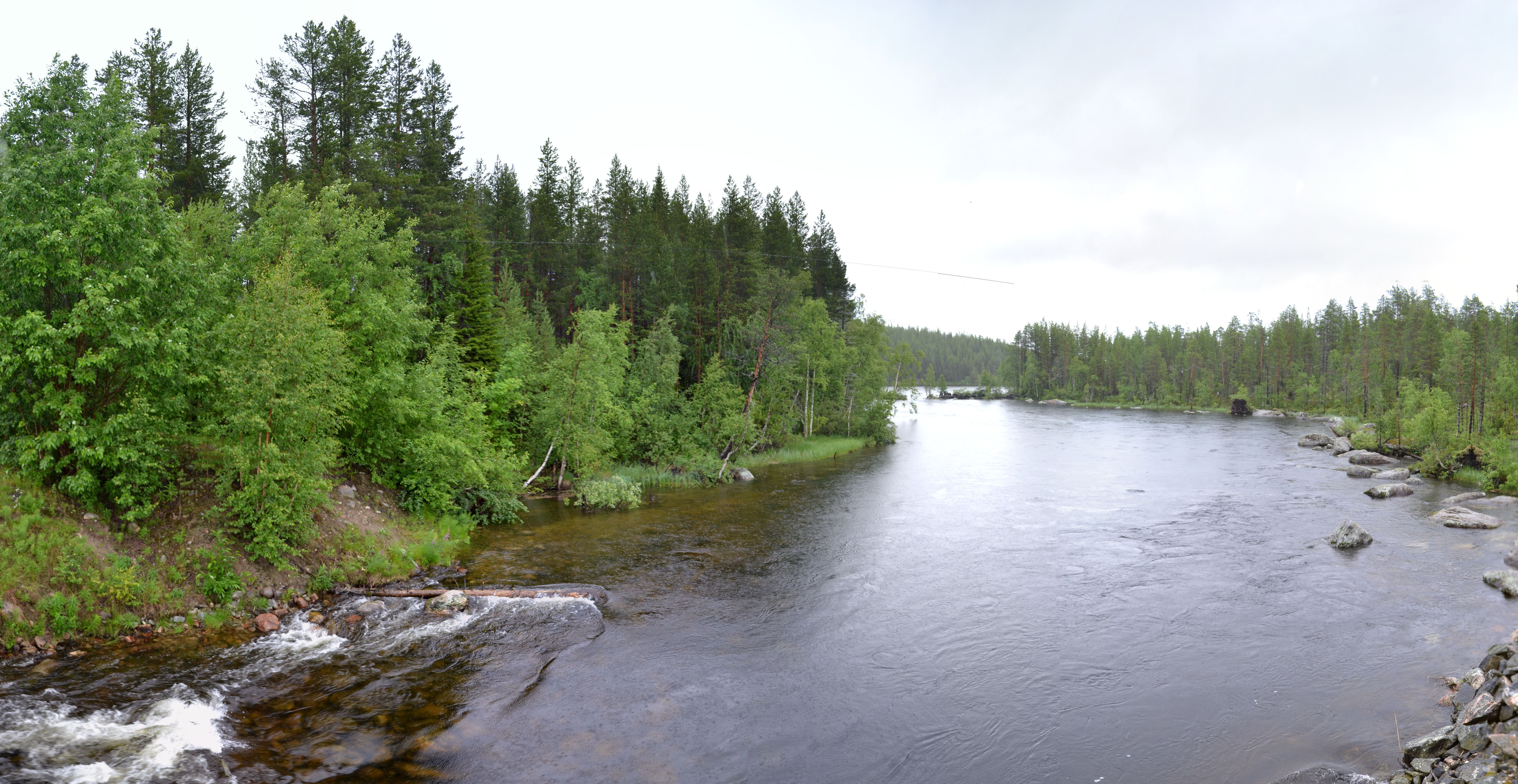 Река Колвица в дождь. Июль 2012